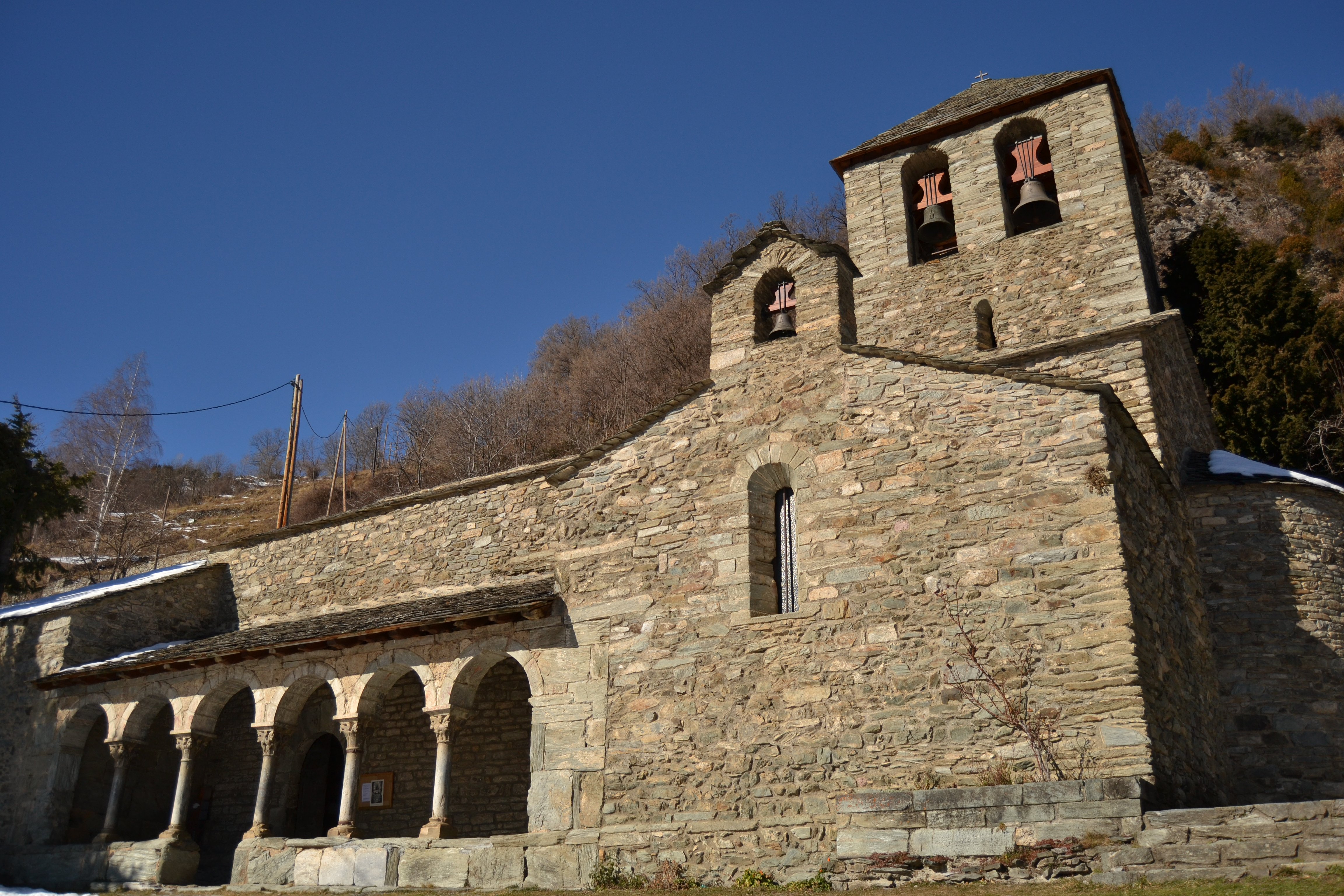 Església de Queralbs, Catalunya